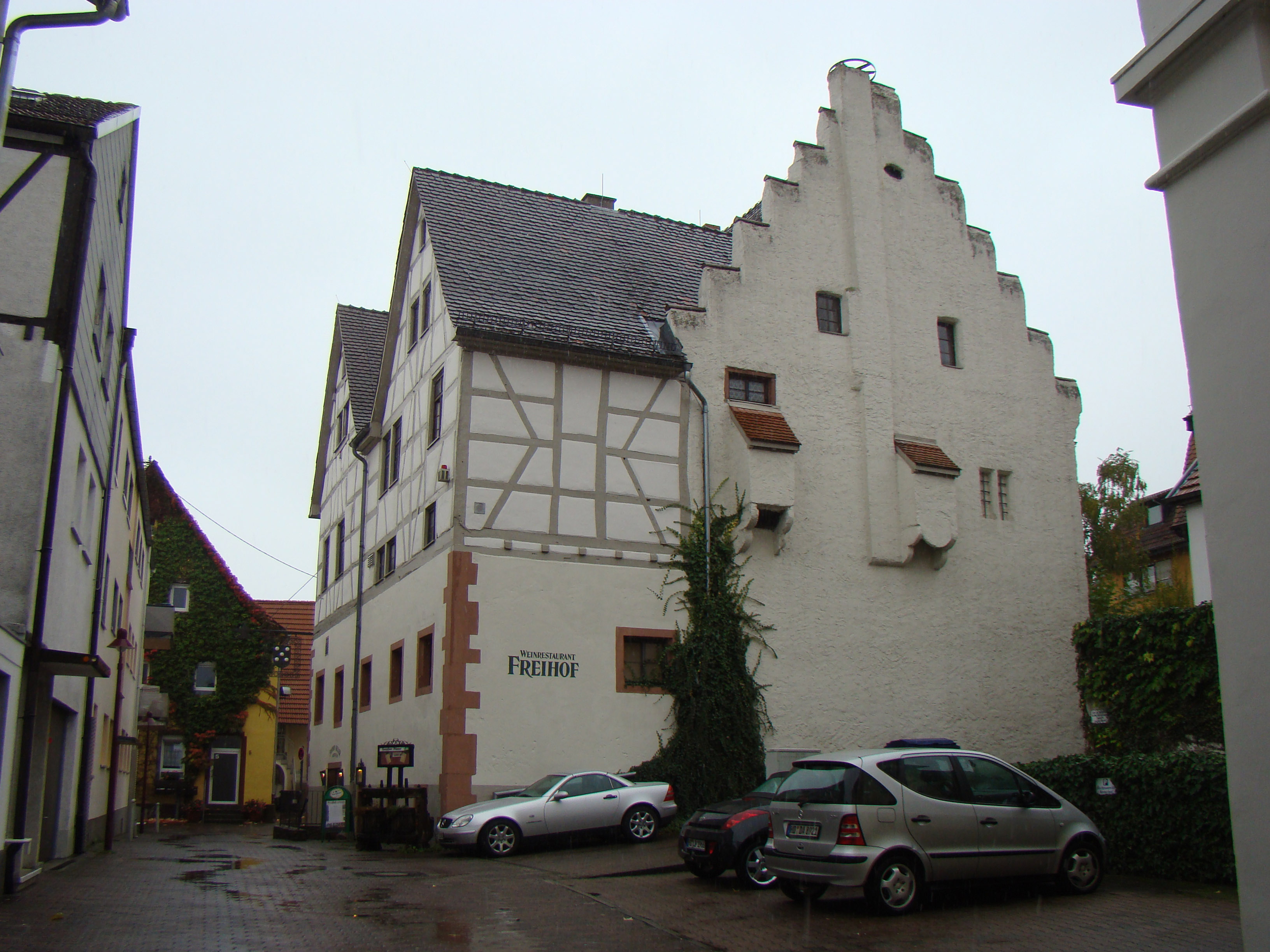 Freihof in Wiesloch